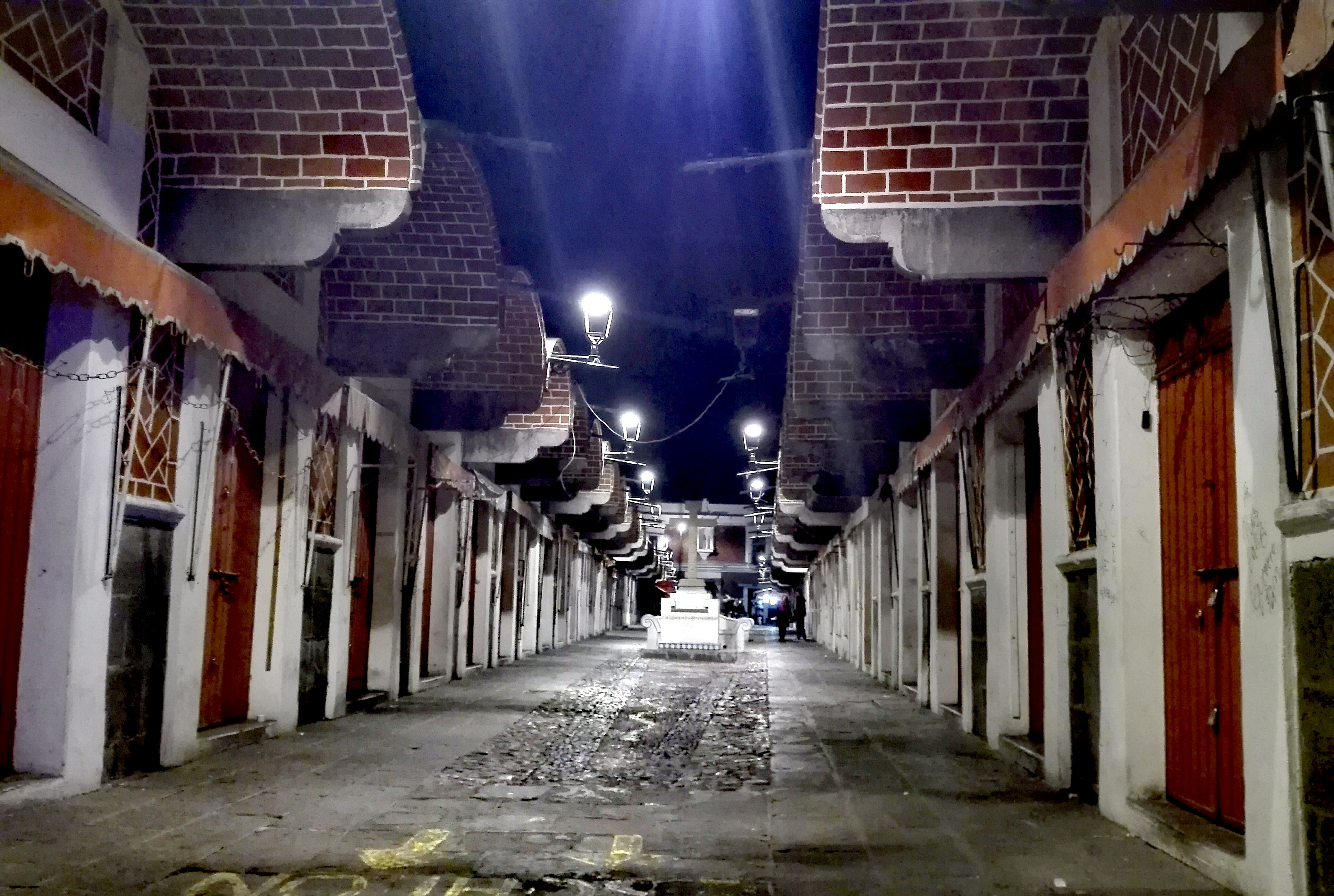 Mercado localizado en el Centro Histórico de la Ciudad de Puebla, México